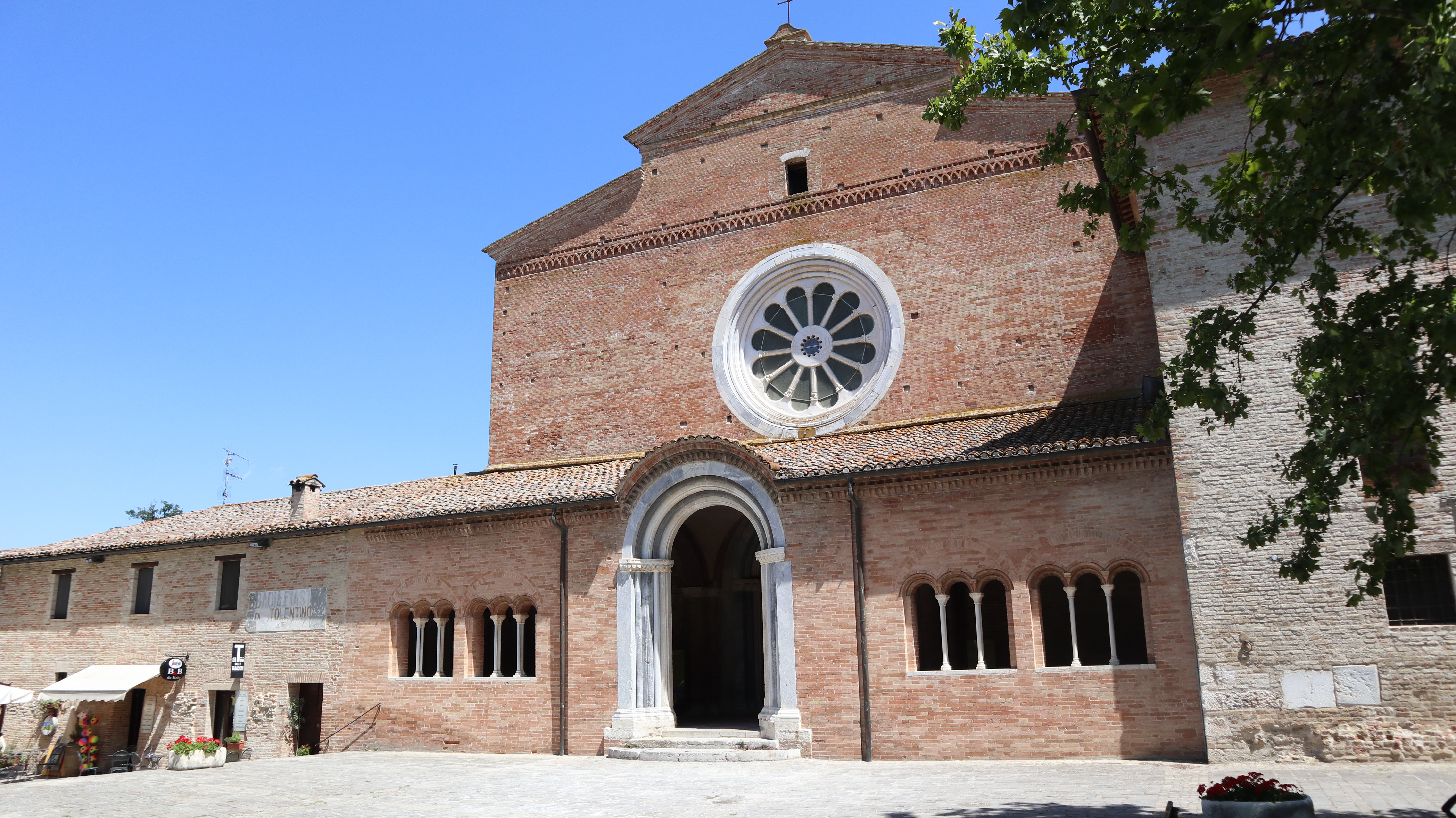 Abbadia di fiastra